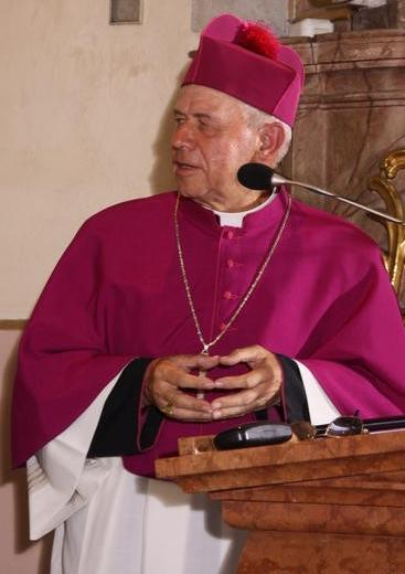 Biskup Stanisław Napierała po Mszy Świętej w Intencji Obrony Życia w I czwartek miesiąca sierpnia w sanktuarium kaliskim